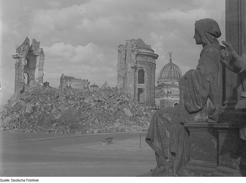 Original image description from the Deutsche FotothekDresden. Blick vom Denkmal Friedrich August II. gegen die Ruine der Frauenkirche